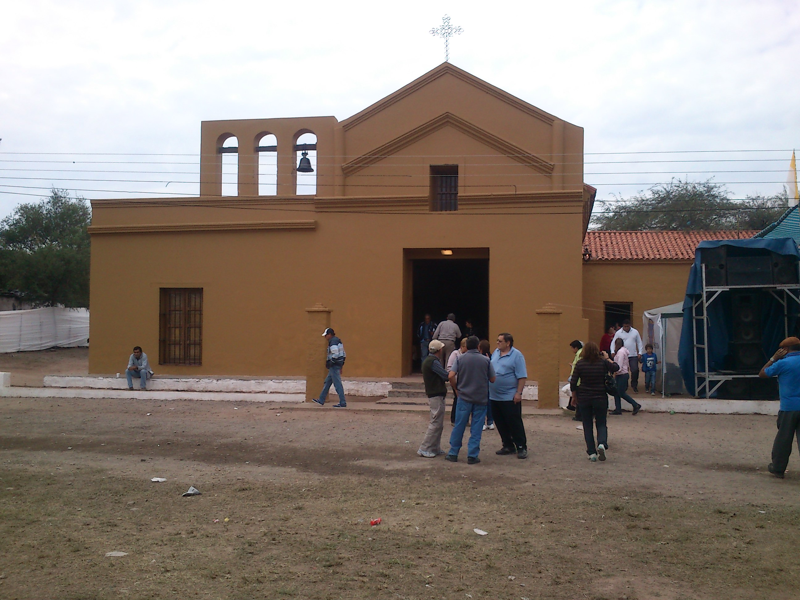 Iglesia de Trancas, Tucumán, Argentina